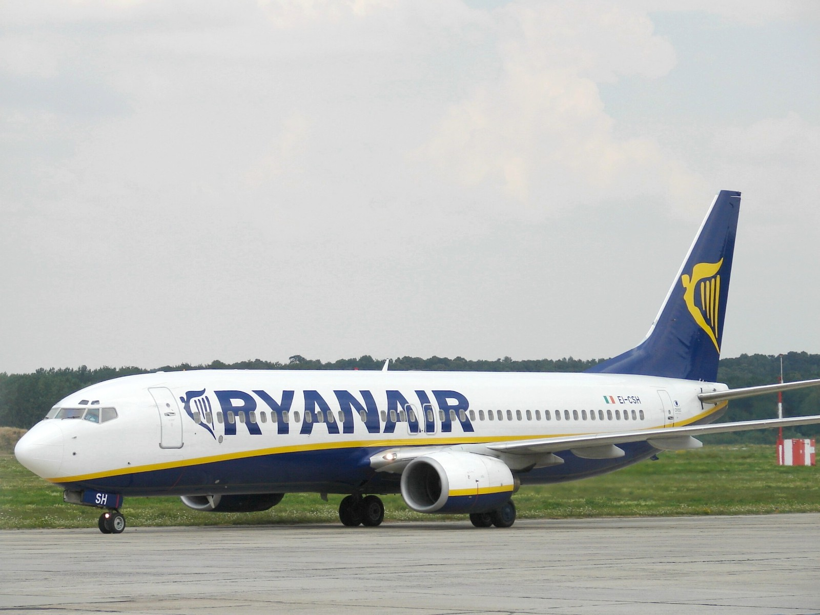 Eine B737-800 der Ryanair auf dem Flughafen Altenburg-Nobitz